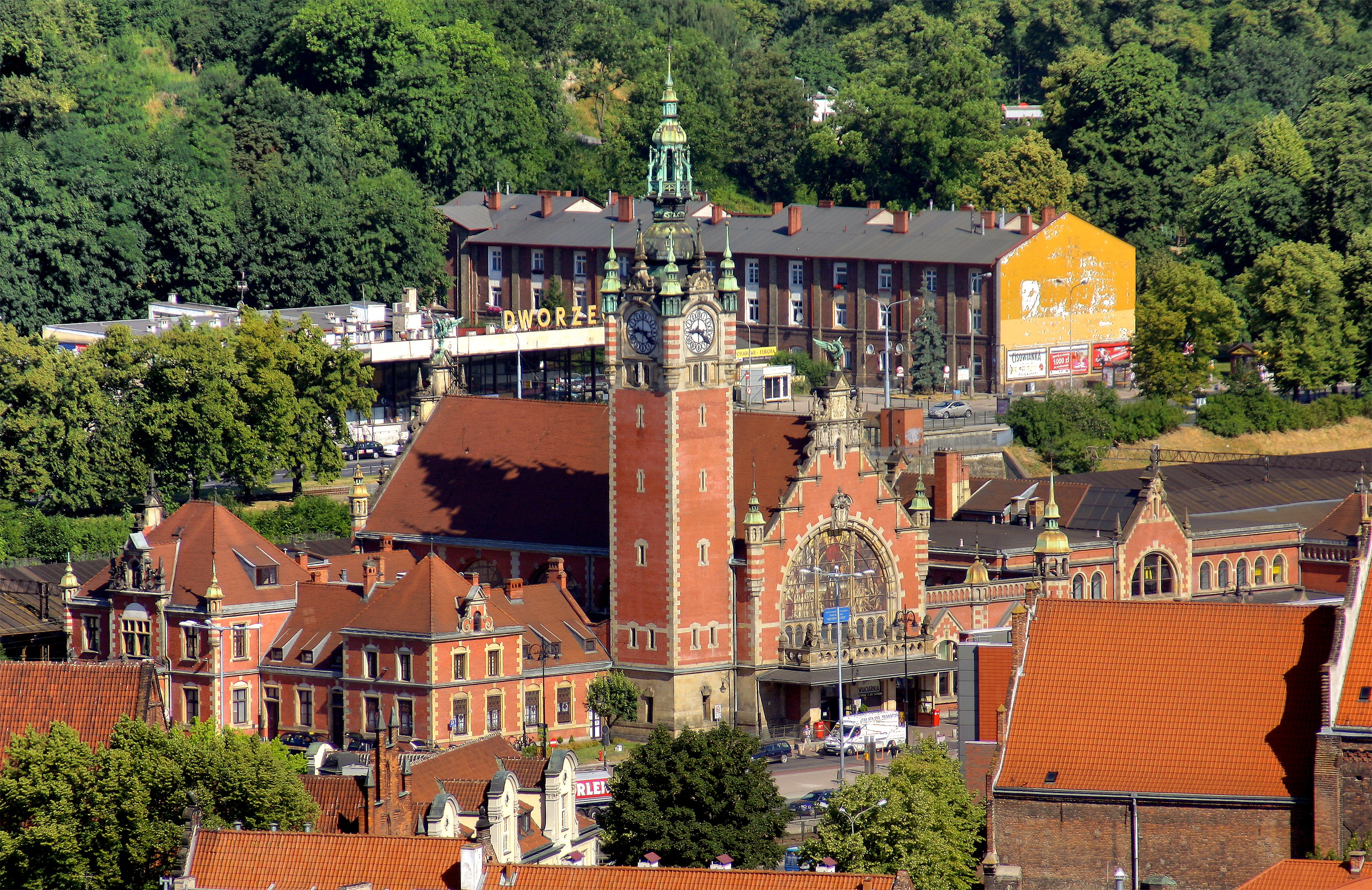 Hauptbahnhof Danzig, Gdańsk Główny, von der Marienkirche aus gesehen.